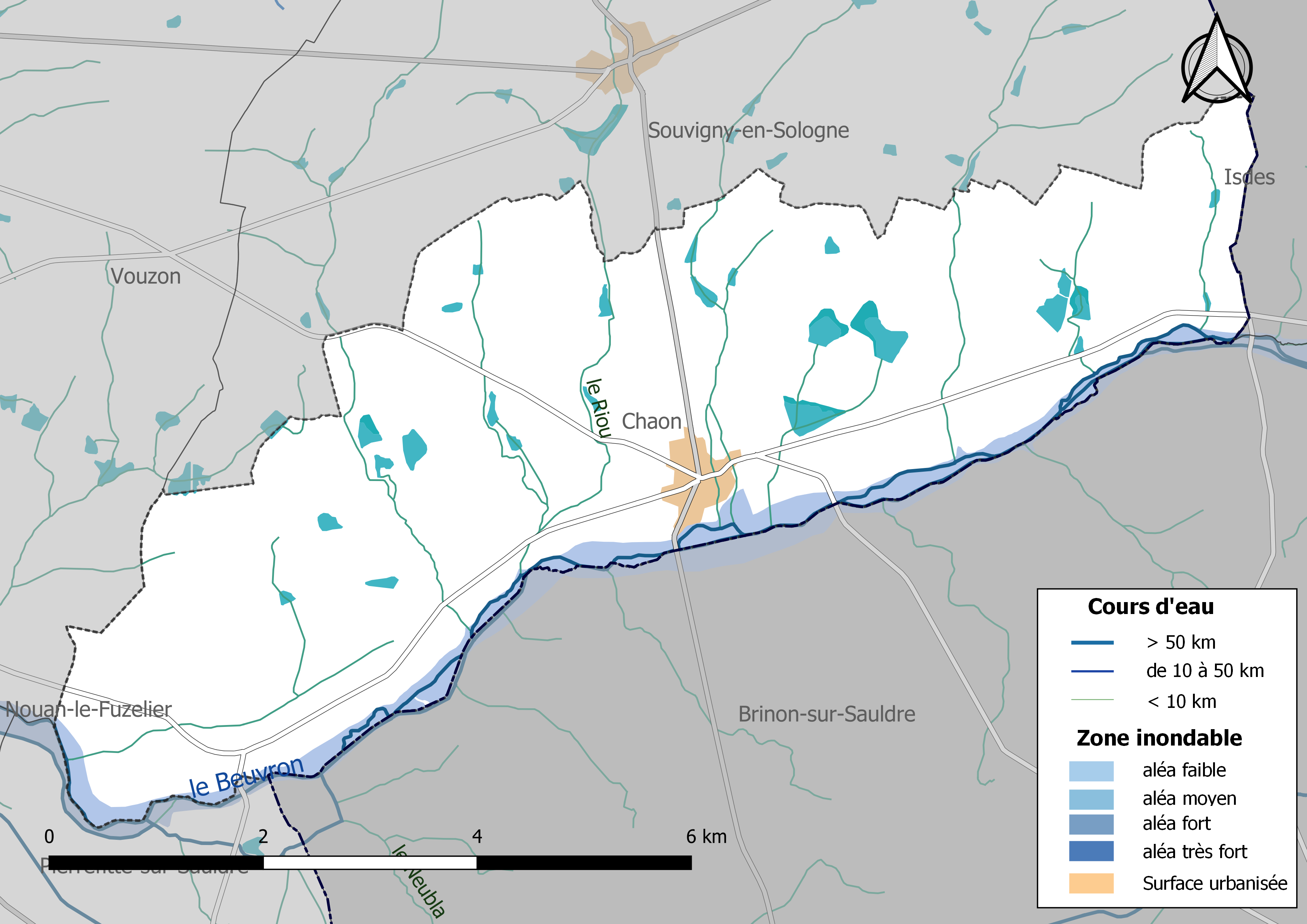 Carte des zones inondables de la commune de Chaon (France).